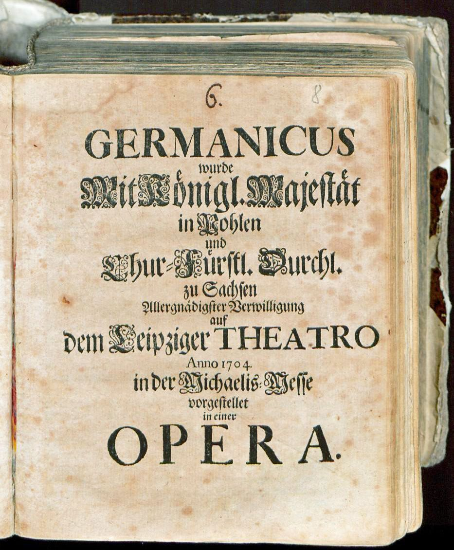 Textbuch zur Oper Germanicus